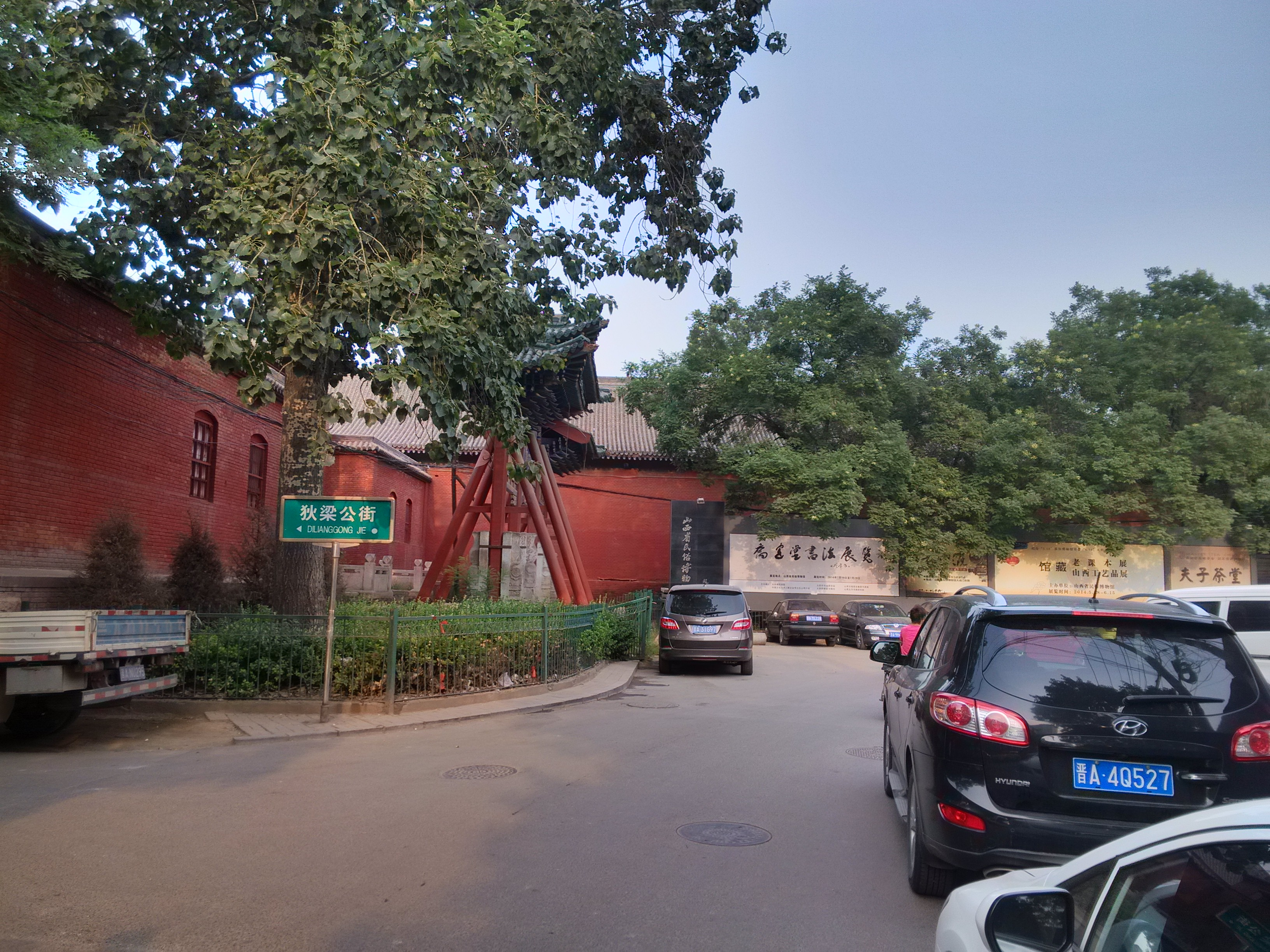 中文（中国大陆）: 太原文庙。是山西省民俗博物馆所在地。